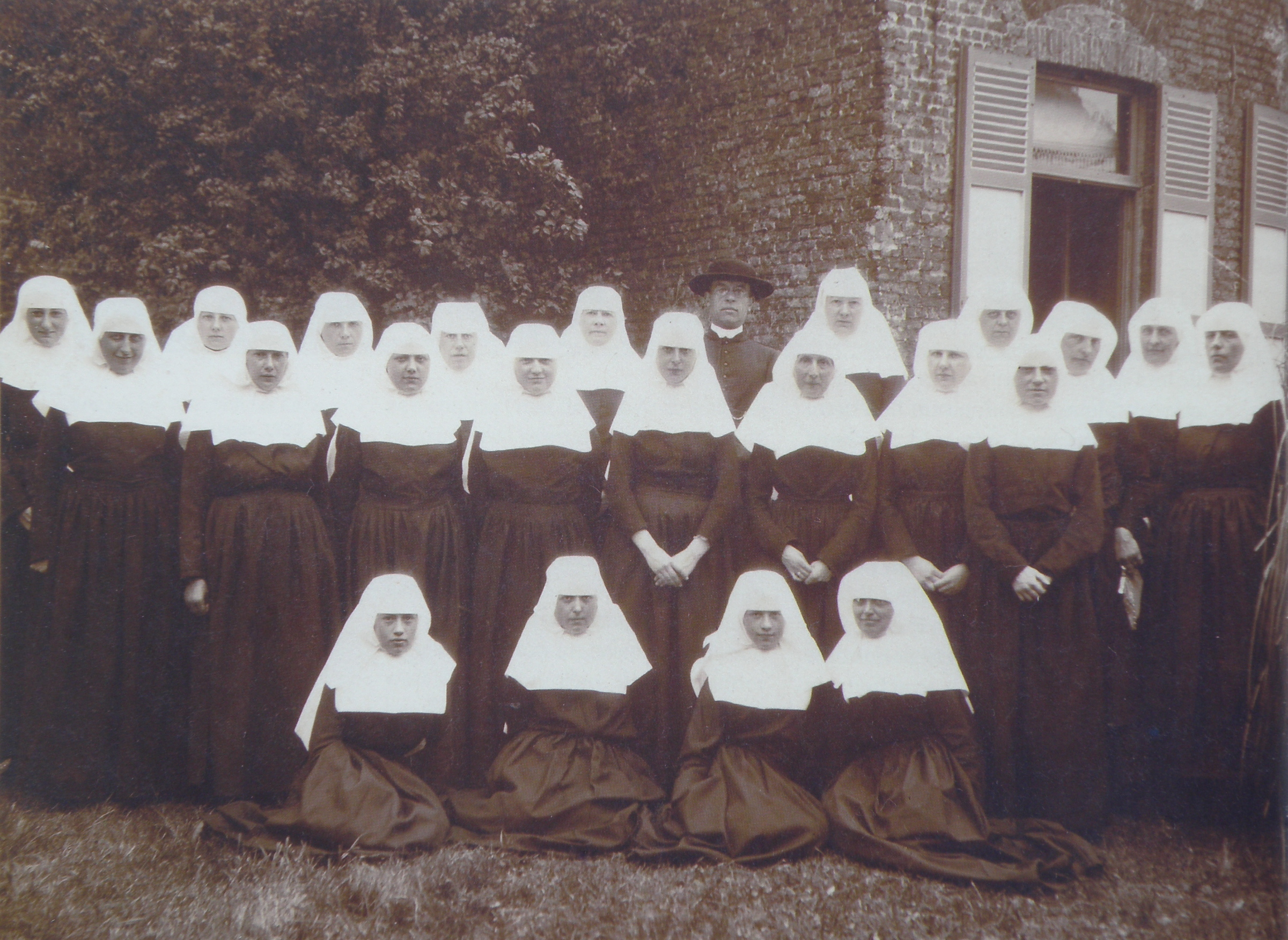 Bruges (Belgique). Béguinage, Rodolphe Hoornaert posant aux côtés de ses religieuses, les Filles de l'Église, vers 1930.